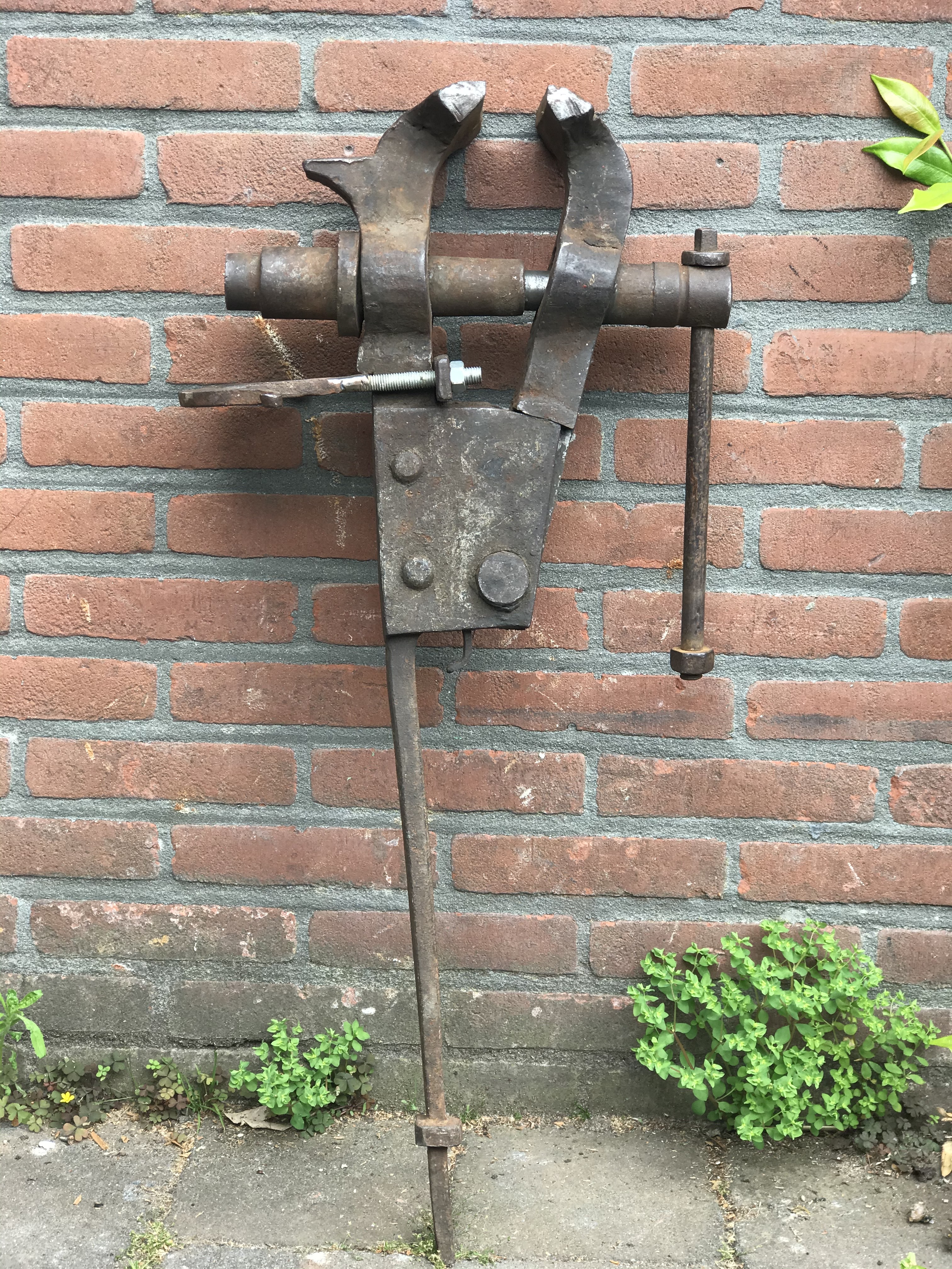 Staartbankschroef